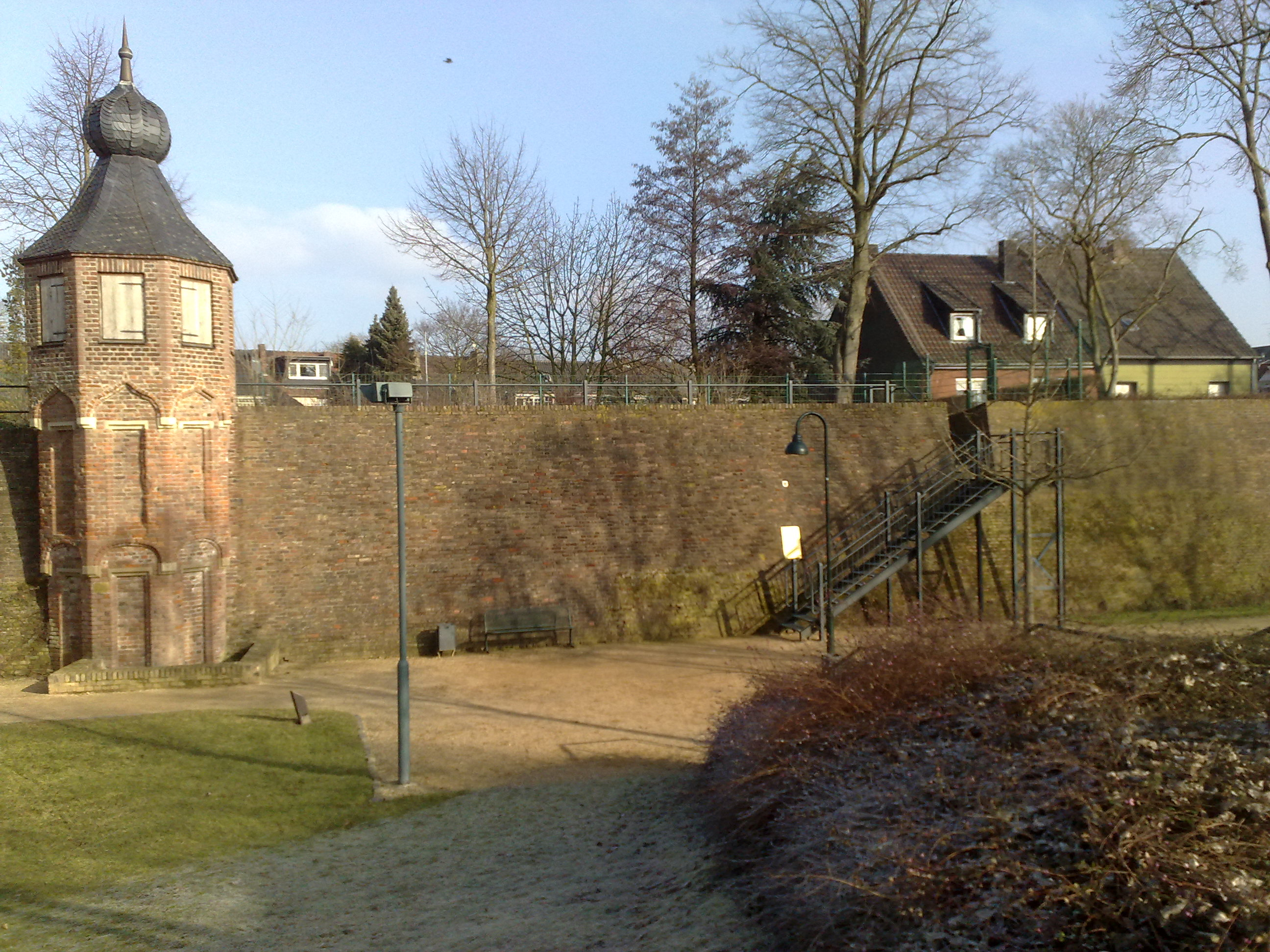 Aufgang zum jüdischen Friedhof auf der alten Stadtmauer ("Am Weißen Turm" in Rees). This image shows a heritage building in Germany, located in the North Rhine-Westphalian city Rees (no. A 61).